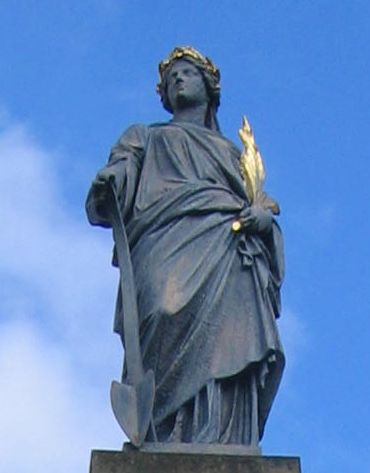 Germaniadenkmal in Ruhland (Baudenkmal, zwischen Kirchplatz und Bahnhofstraße); Statue Vorderseite (Südseite)